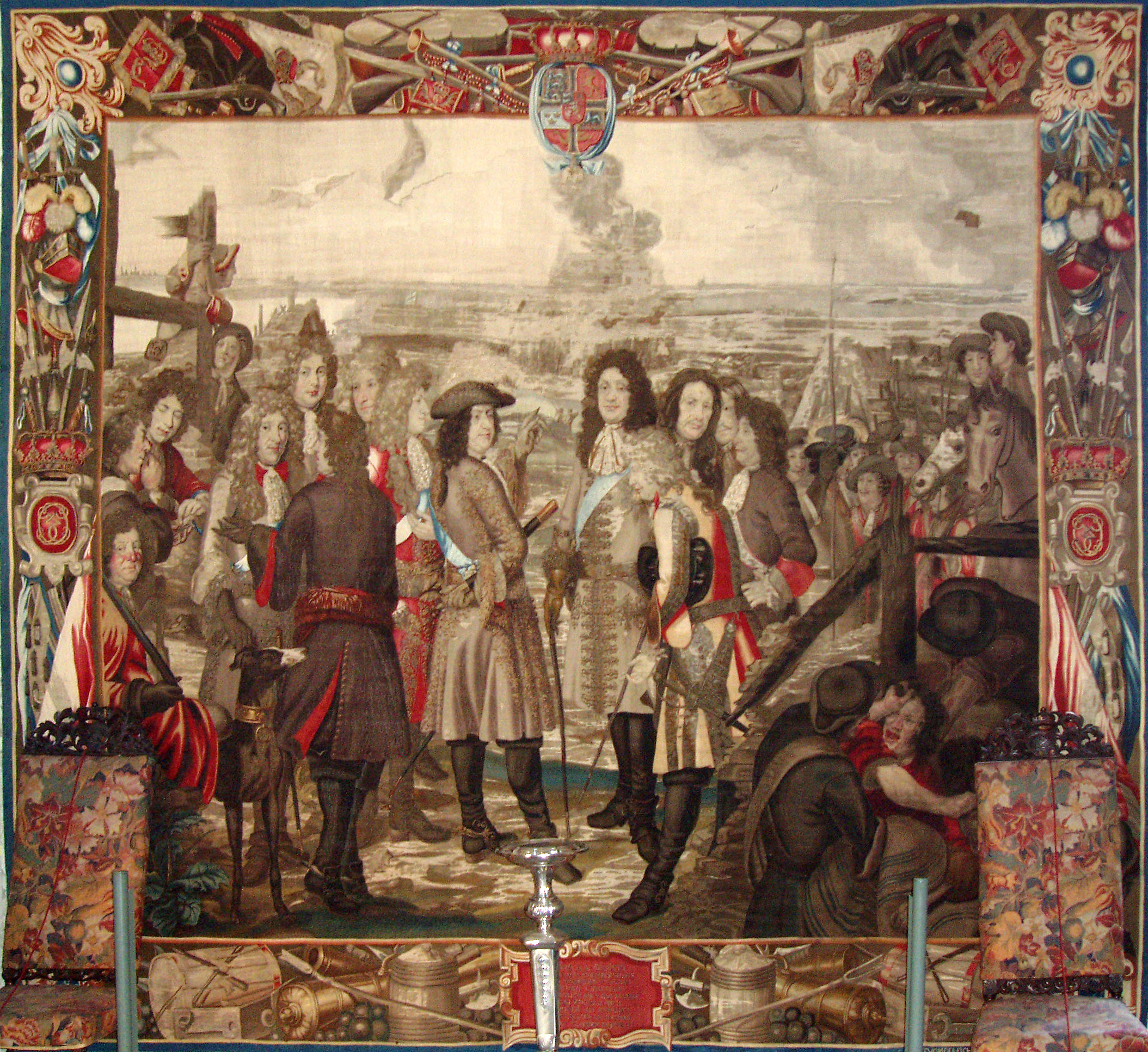 En af gobelinerne i riddersalen på Rosenborg Slot i København, Denmark